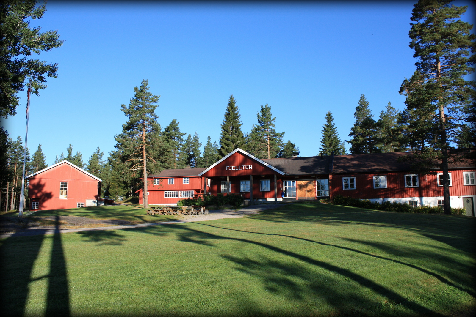 Fjelltun Ungdomssenter og Leirskole ved Gautefall i Telemark